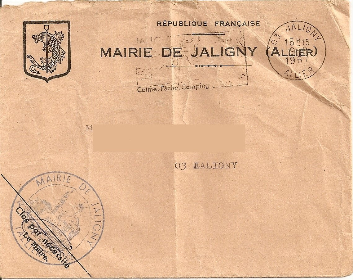 Jaligny-sur Besbre (France) - Enveloppe officielle de la mairie en 1967 aux armes de la ville - Flamme philatélique